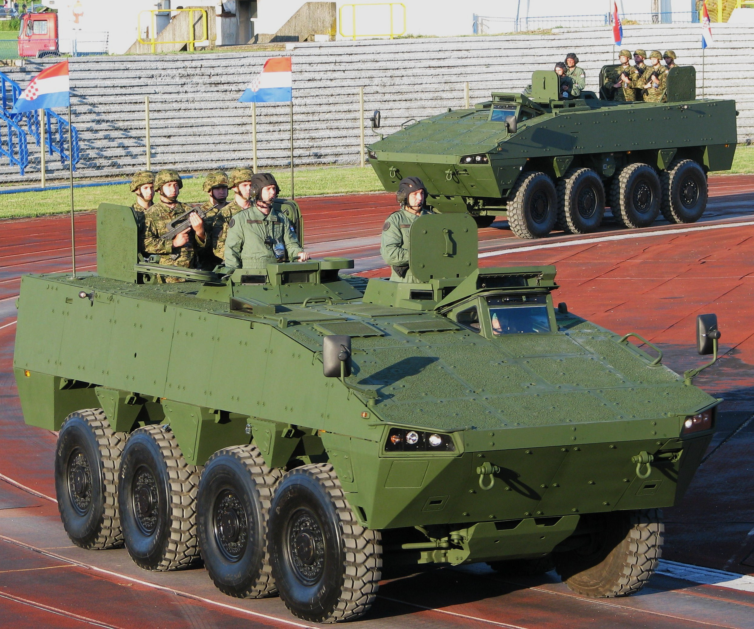 Patria AMV u Karlovcu 2009.